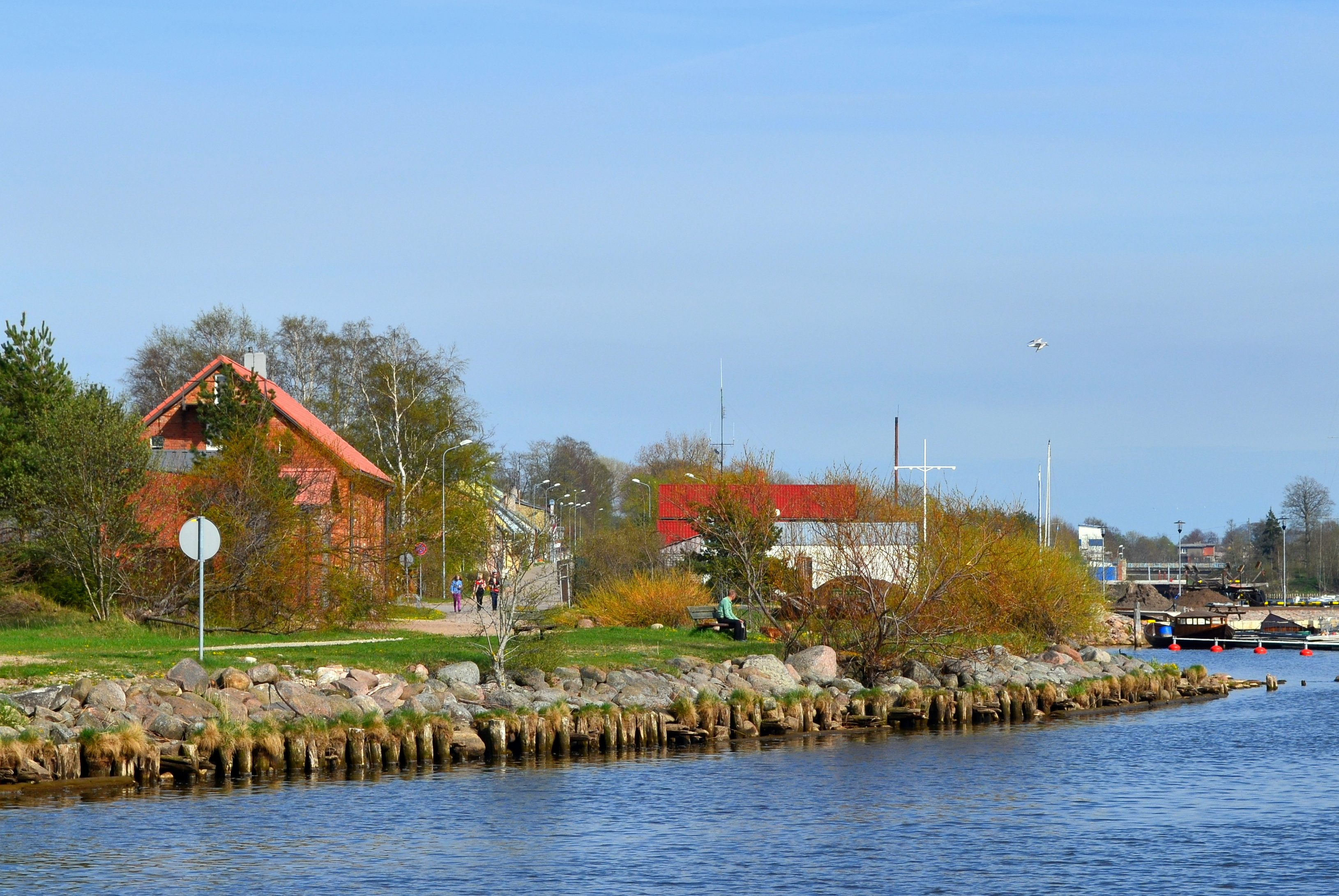 Pāvilosta